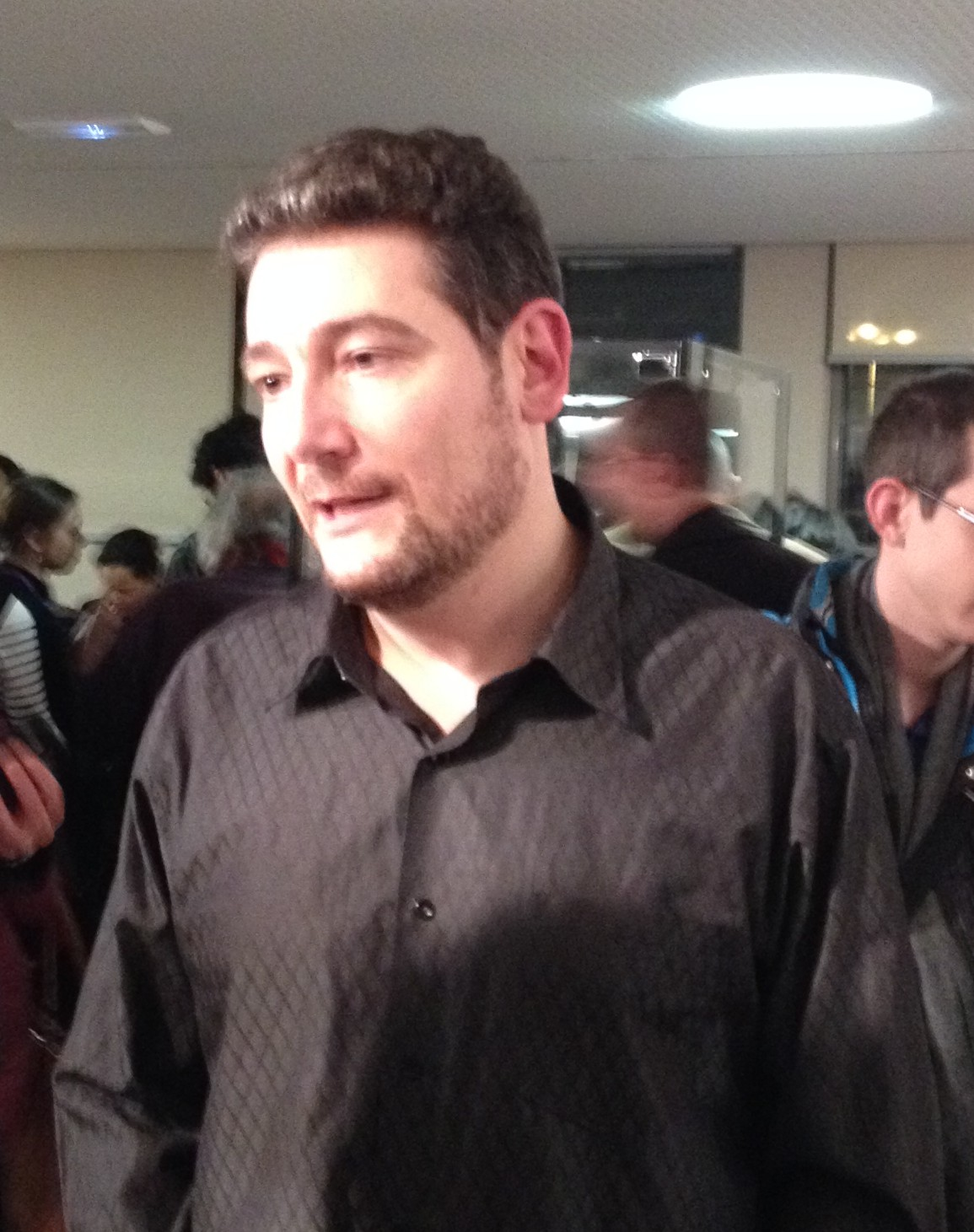 Nicolas Gabion lors du 5e festival Science et Manga à la bibliothèque universitaire de l'université Claude-Bernard Lyon 1, le 18 février 2014.